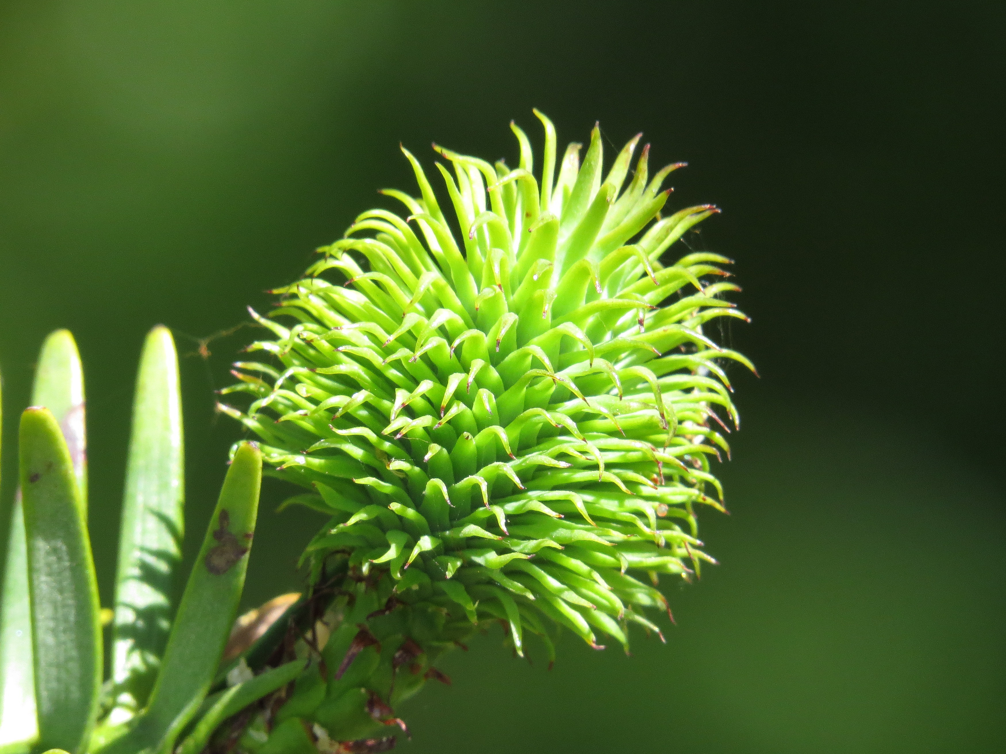 Cono femenino de Wollemia nobilis, Parque del Retiro, Madrid, España.